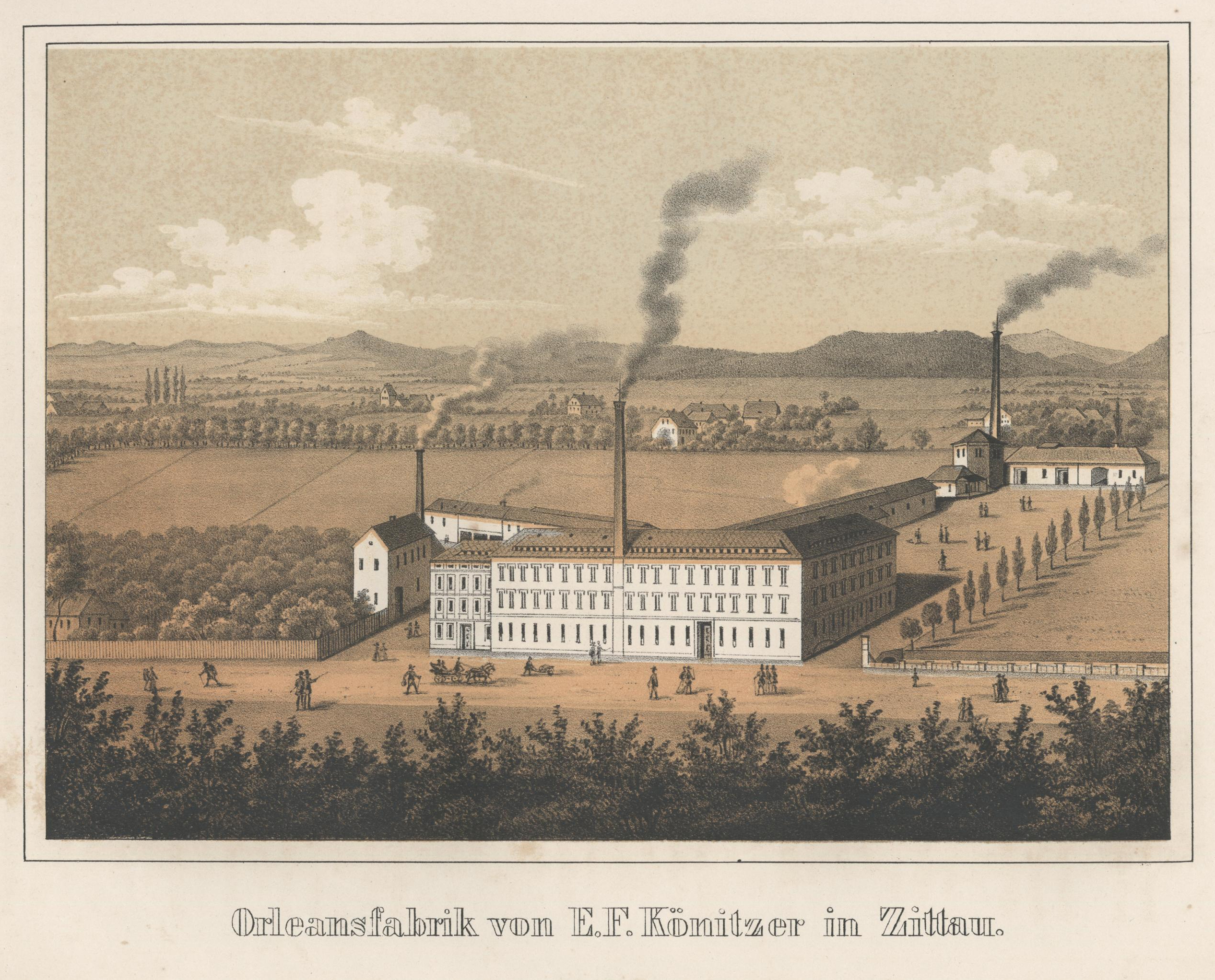 Orleansfabrik von E. F. Könitzer in Zittau aus: Album der Sächsischen Industrie Erster Band